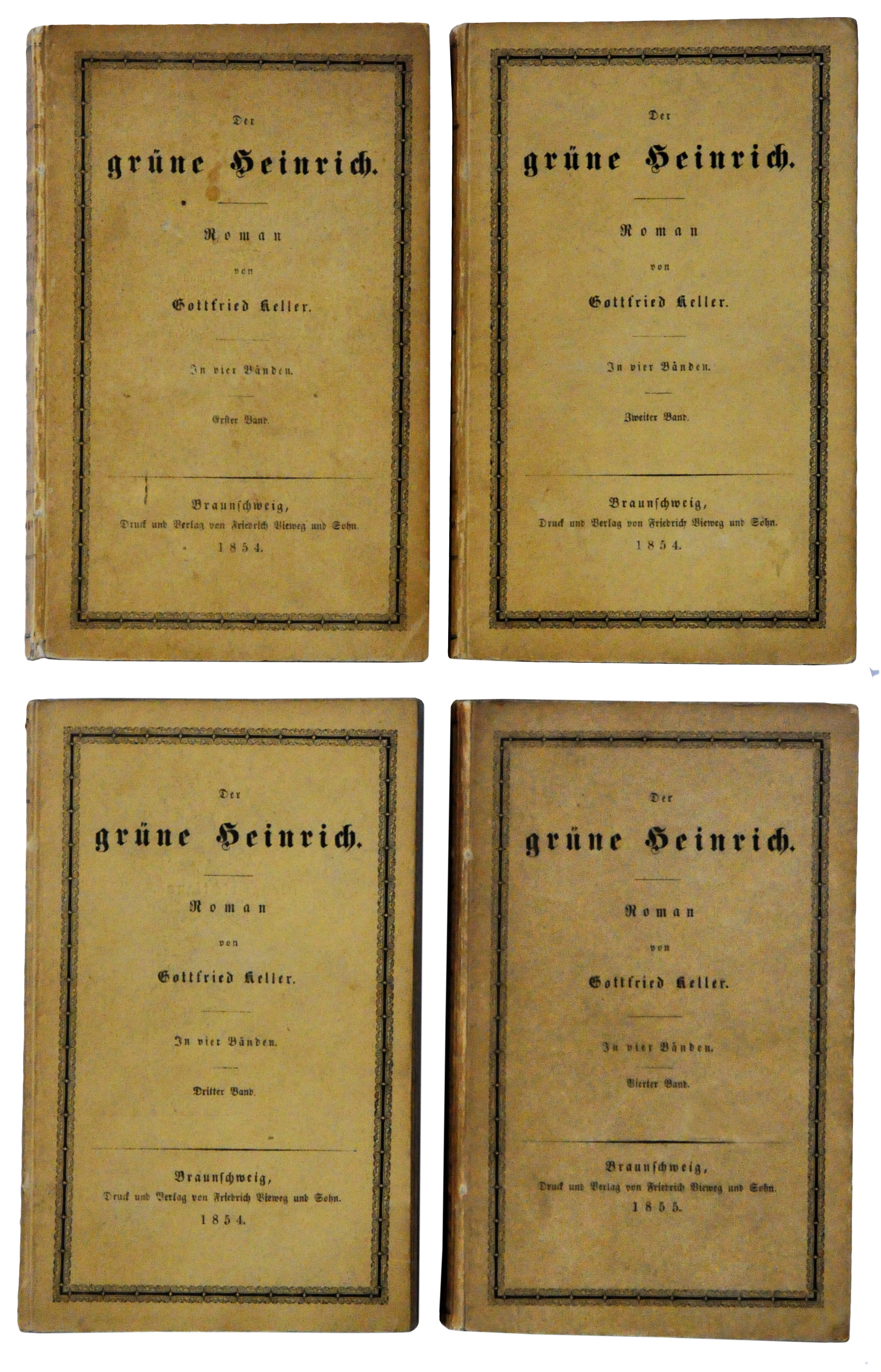 Keller, Gottfried: Der grüne Heinrich. Roman. Braunschweig: F. Viehweg und Sohn, 4 Bde. 1854/55: 396 + 456 + 359 + 483 Seiten; Wilpert/Gühring² 9 Erstausgabe/Erstdruck; Original-Pappbände des Verlags, kenntlich an den Verlagsanzeigen auf den Hinterdeckeln; Vorderdeckel 16,7 x 10,5 cm.